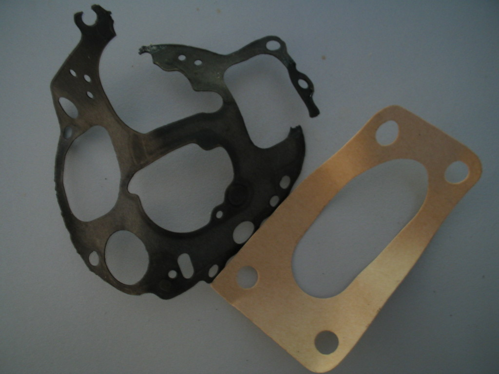 pakkingen, 2004